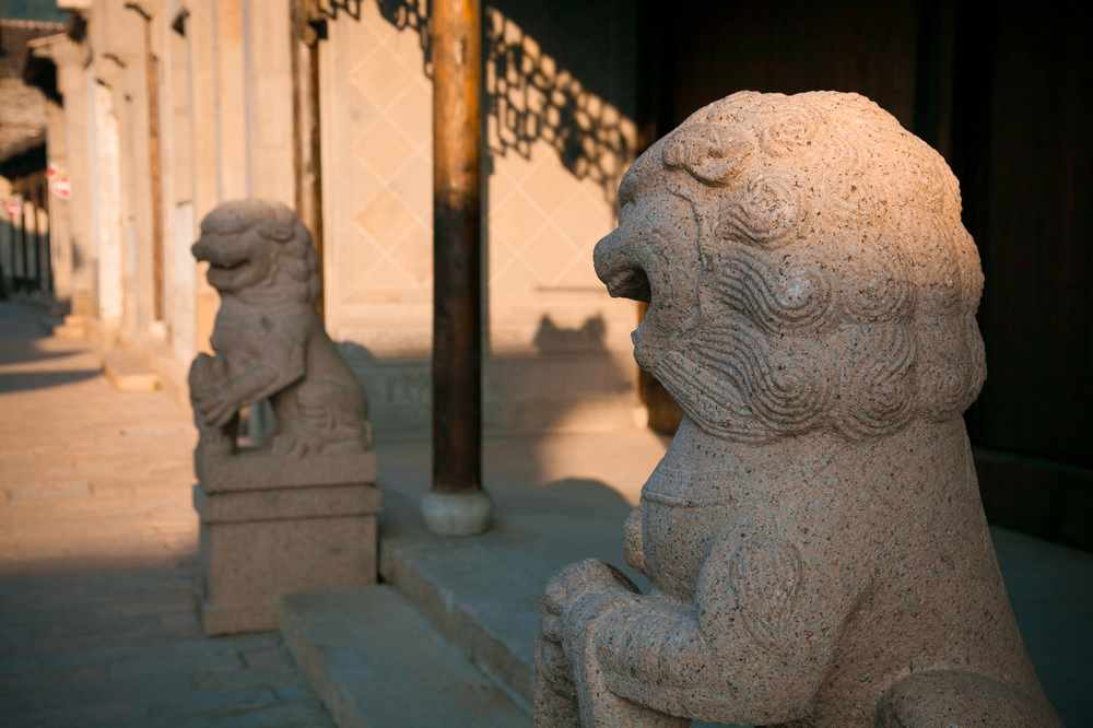 中文（中国大陆）: 惠山古镇石狮子